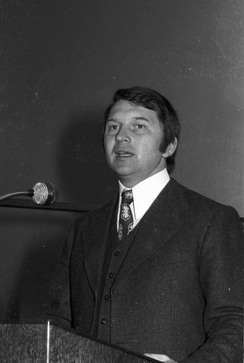 Haberl referiert vor der Mitgliederversammlung des Verbandes des Kraftfahrzeughandels und -gewerbes im Kieler Schloss über "Arbeit, Aufgaben und Ziel der Verbände unserer Branche".